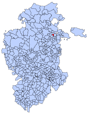 Situación de Cascajares de Bureba en el mapa de Burgos.